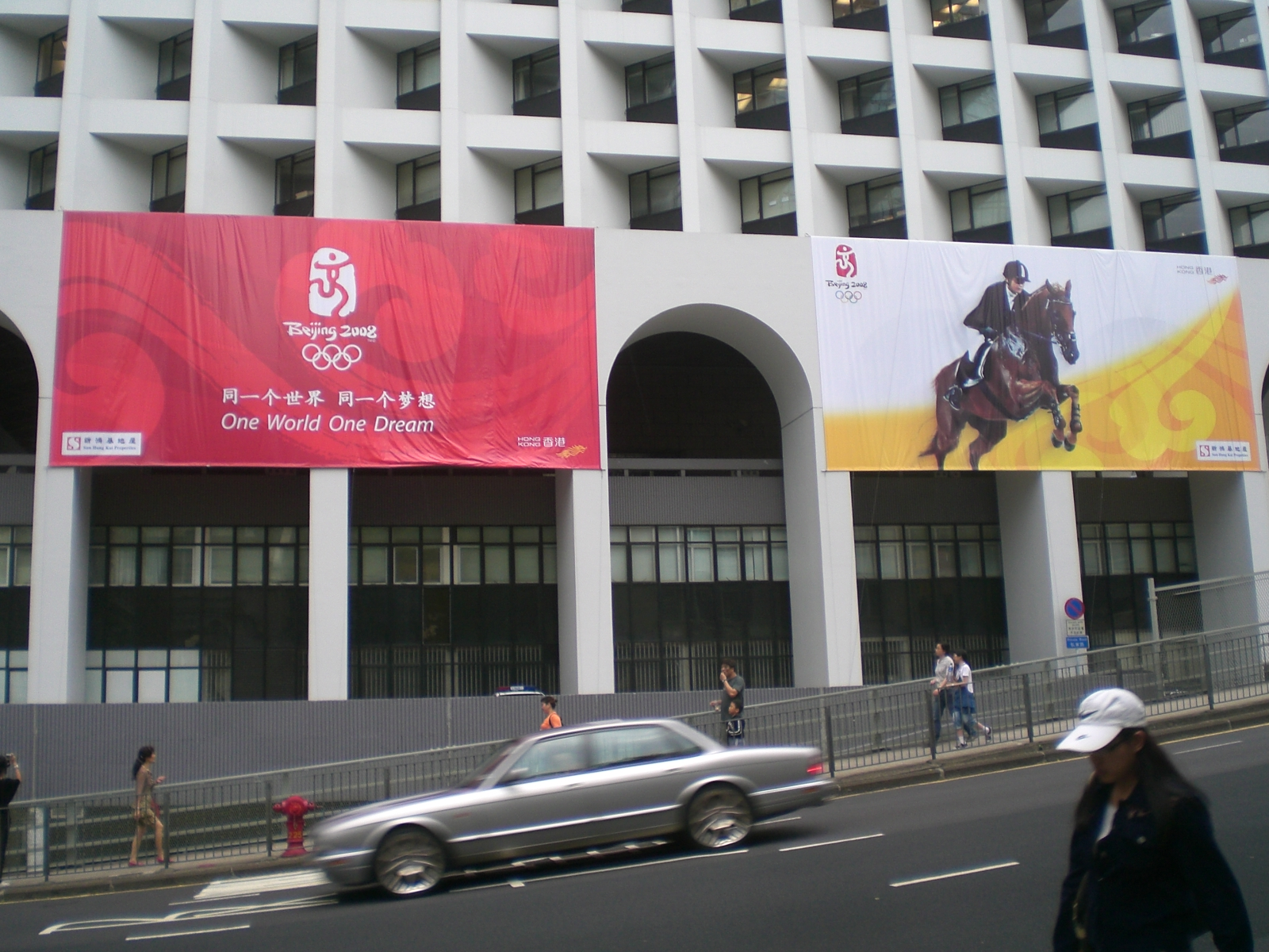 2008年夏季奧林匹克運動會香港區火炬接力, 海報於美利大廈